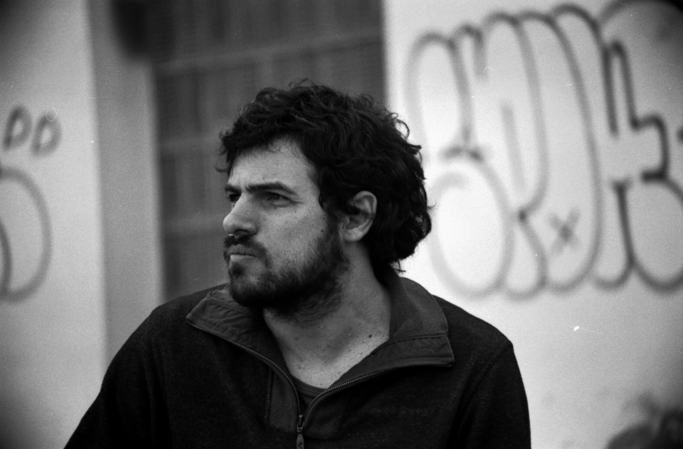 El activista Enric Duran